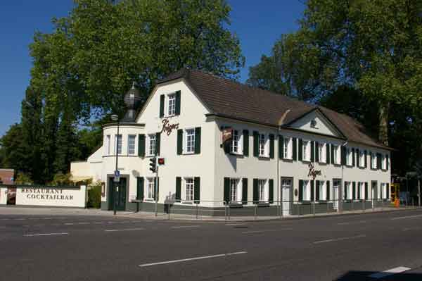 Haus Krügers am Berliner Platz. Gasthof der Posthalterei ab 1793 und seither gastronomisch genutzt.